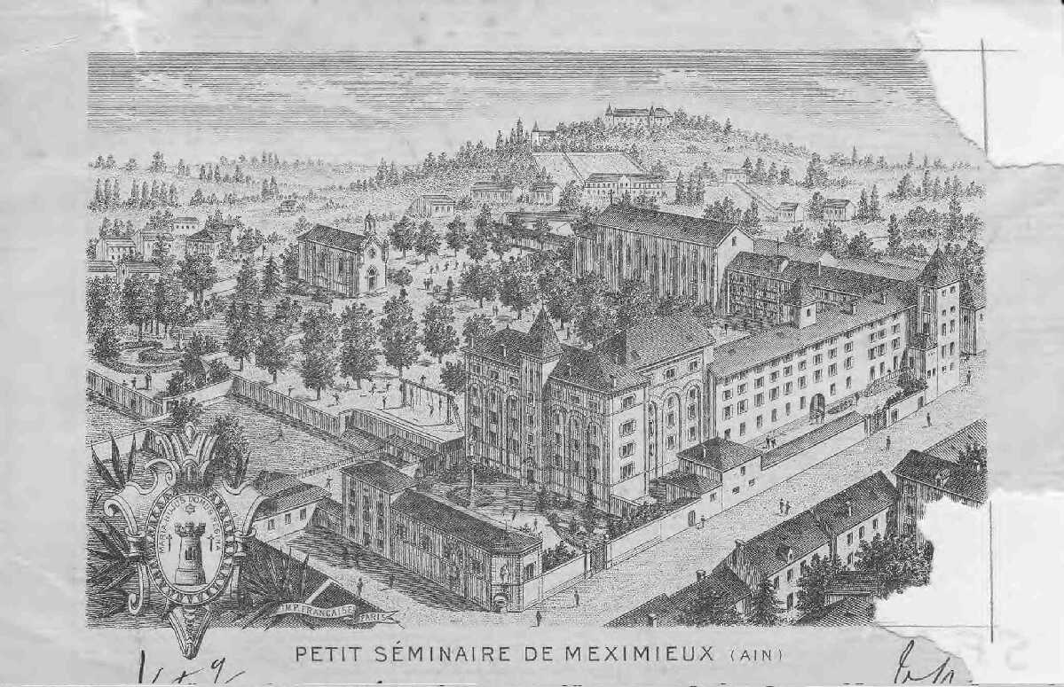 Gravure ancienne du Petit séminaire de Meximieux.